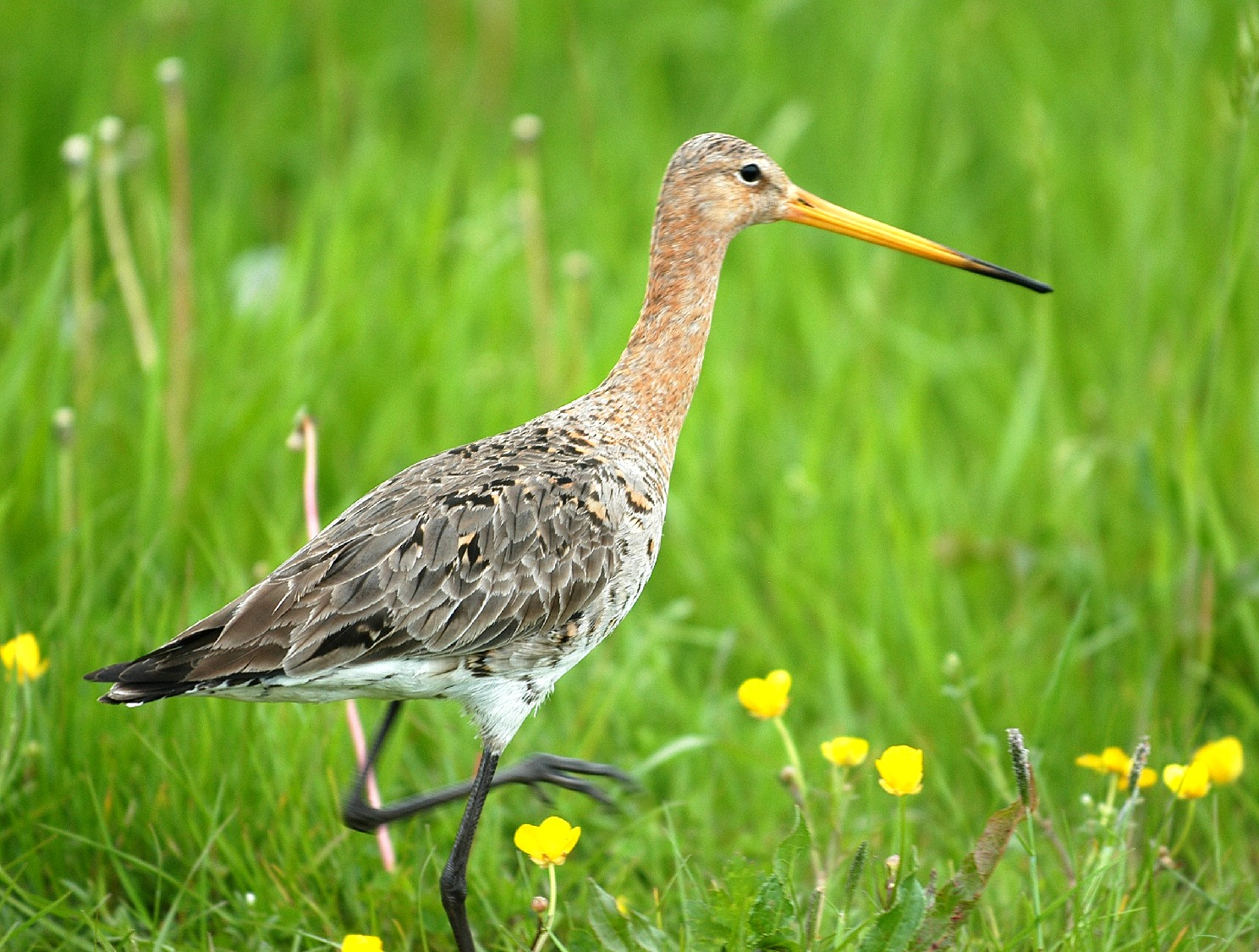 Grutto opzij gezien, foto ter beschikking gesteld door Fred Vloo Categorie:Afbeelding vogel